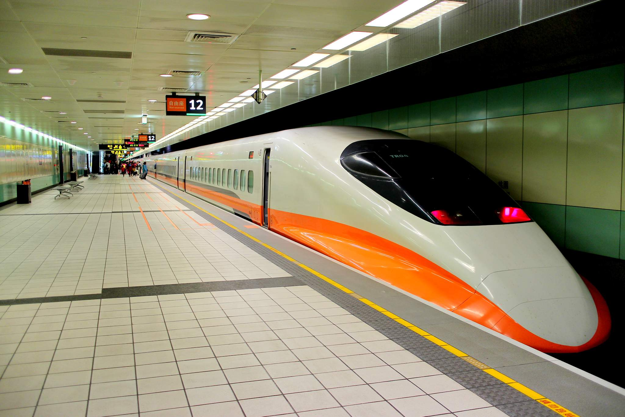 中文（台灣）: 2015年1月31日停靠於桃園高鐵站南下月台的一般列車